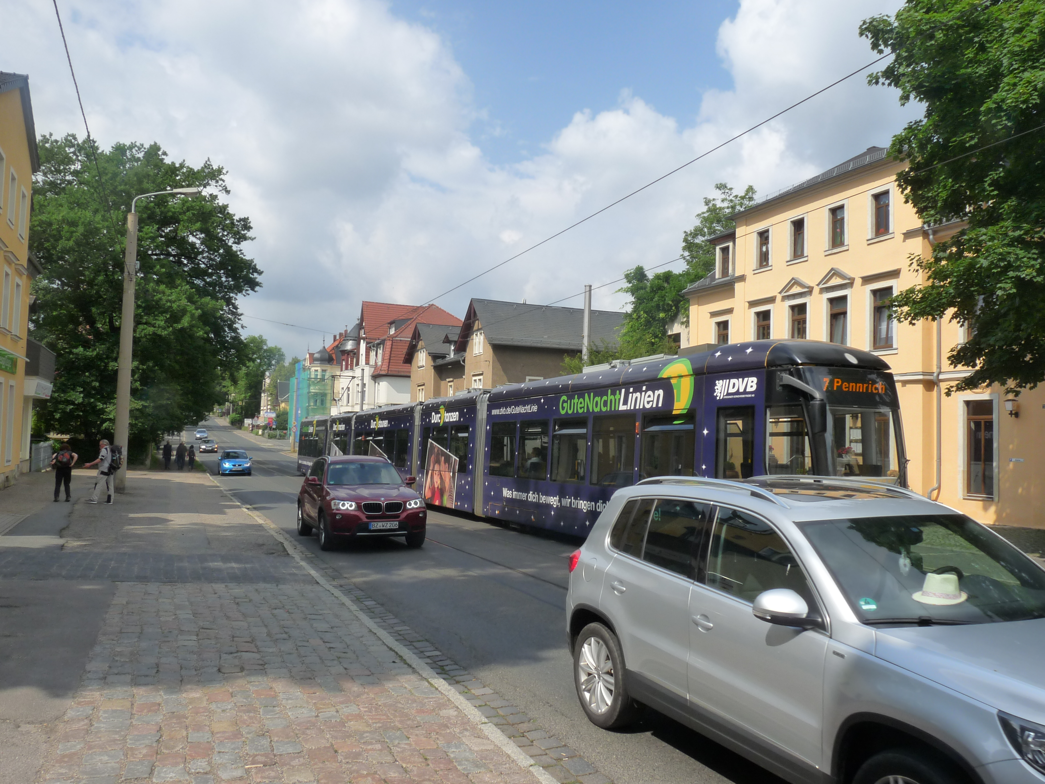 Trams in Dresden